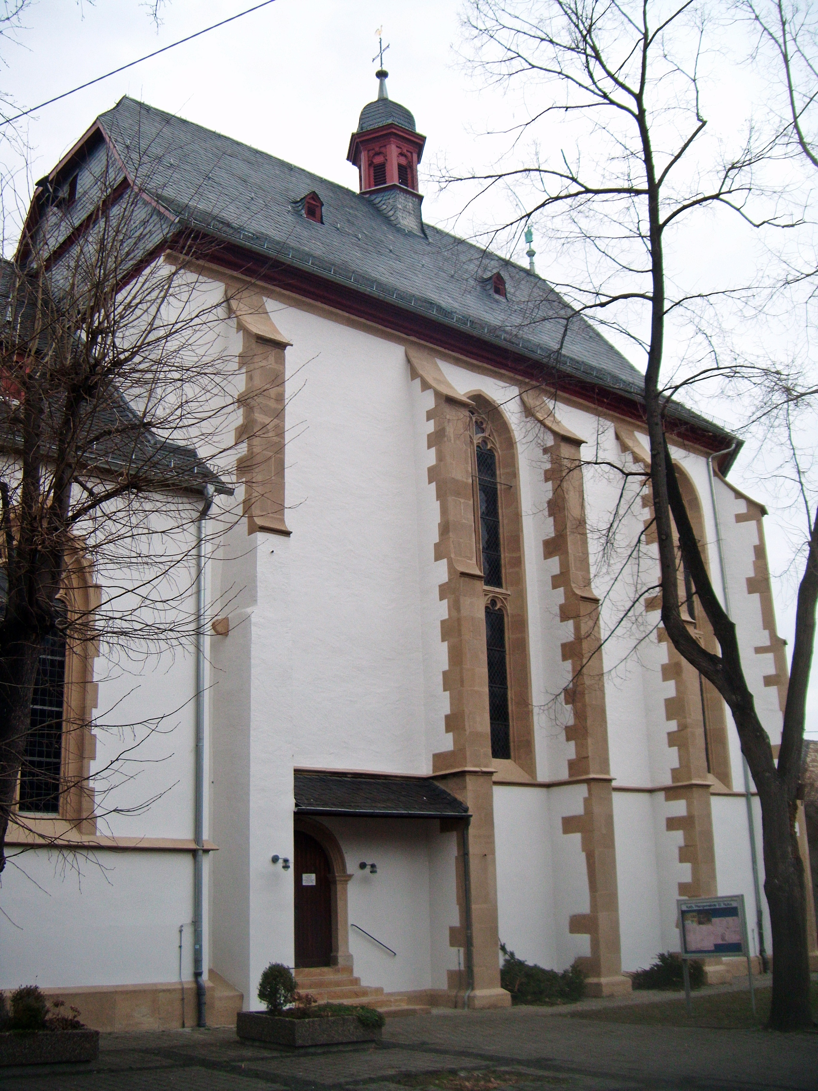 Simultankirche Gau-Odernheim, Chor